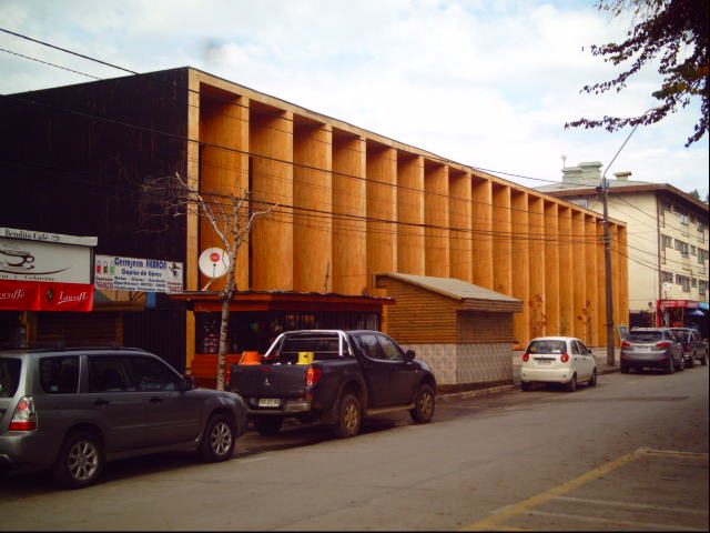 Casa de la Cultura, en Constitución (Chile), construida por el laureado arquitecto Alejandro Aravena.